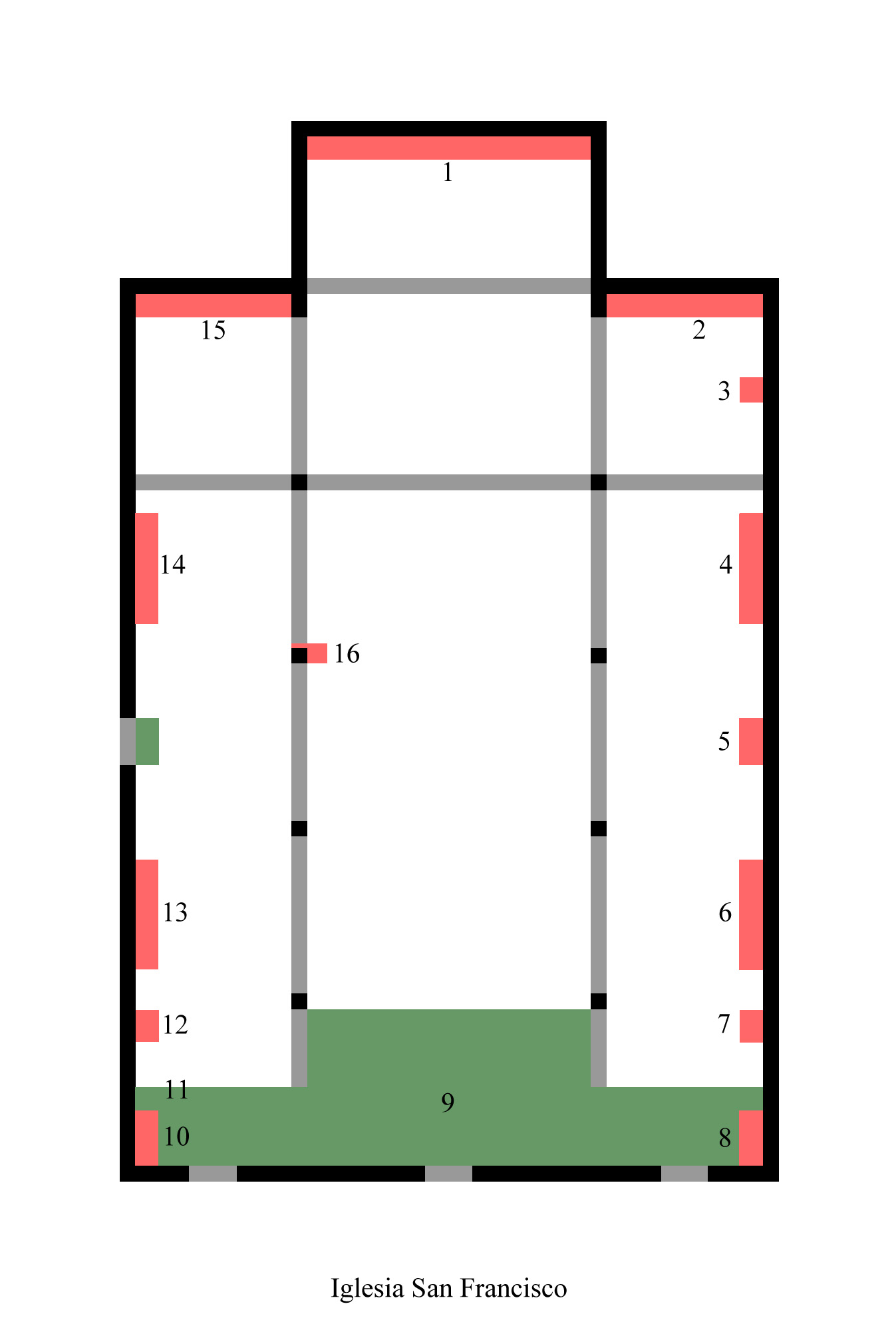 Nicht maßstabgerechte Skizze der Kirche San Francisco in Santa Cruz de Tenerife 1 El altar mayor 2 Retablo del señor de Las Tribulaciones, antes de San Luis, Rey de Francia 3 Imagen del Sagrado Corazón de Jesús 4 Retablo de San José 5 Retablo de la Buena Muerte 6 Retablo de San Antonio de Padua 7 Imagen del Hermano Pedro 8 Pila bautismal 9 Galeria de órgano 10 Retablo de los animas 11 Piedra sepulcral 12 El sueño de San José 13 Retablo de la Virgen de la Consolación 14 Retablo de San Buenaventura 15 Retablo de la Virgen del Retiro 16 Púlpito